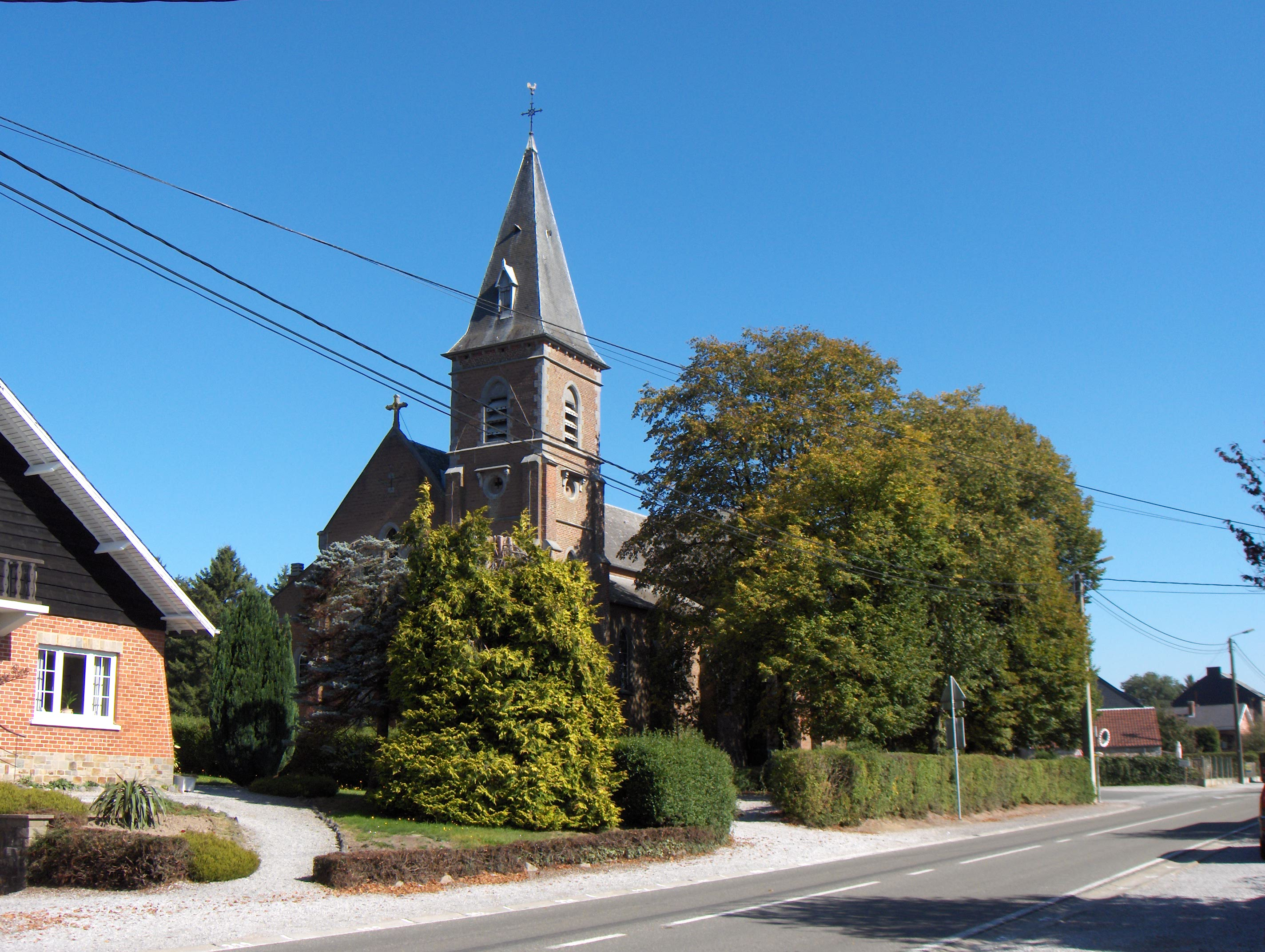 Pontaury, Ortsteil der Gemeinde Mettet (Belgien, Provinz Namur), Kirche des Ortsteils